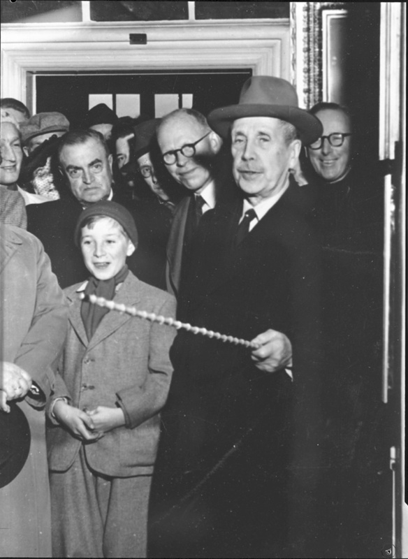 Omvisning på Frogner Hovedgård (Oslo Bymuseum). Foran Stian Herlofsen Finne-Grønn